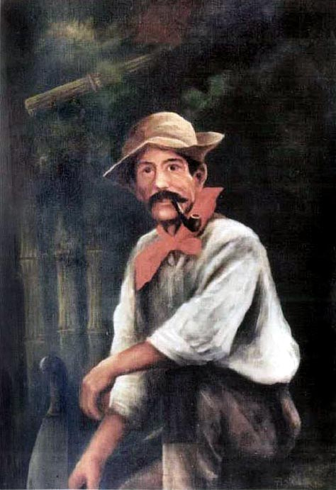 Trabajador, de Antolín Chichilla (1876-1942). Óleo sobre tela, 1937.